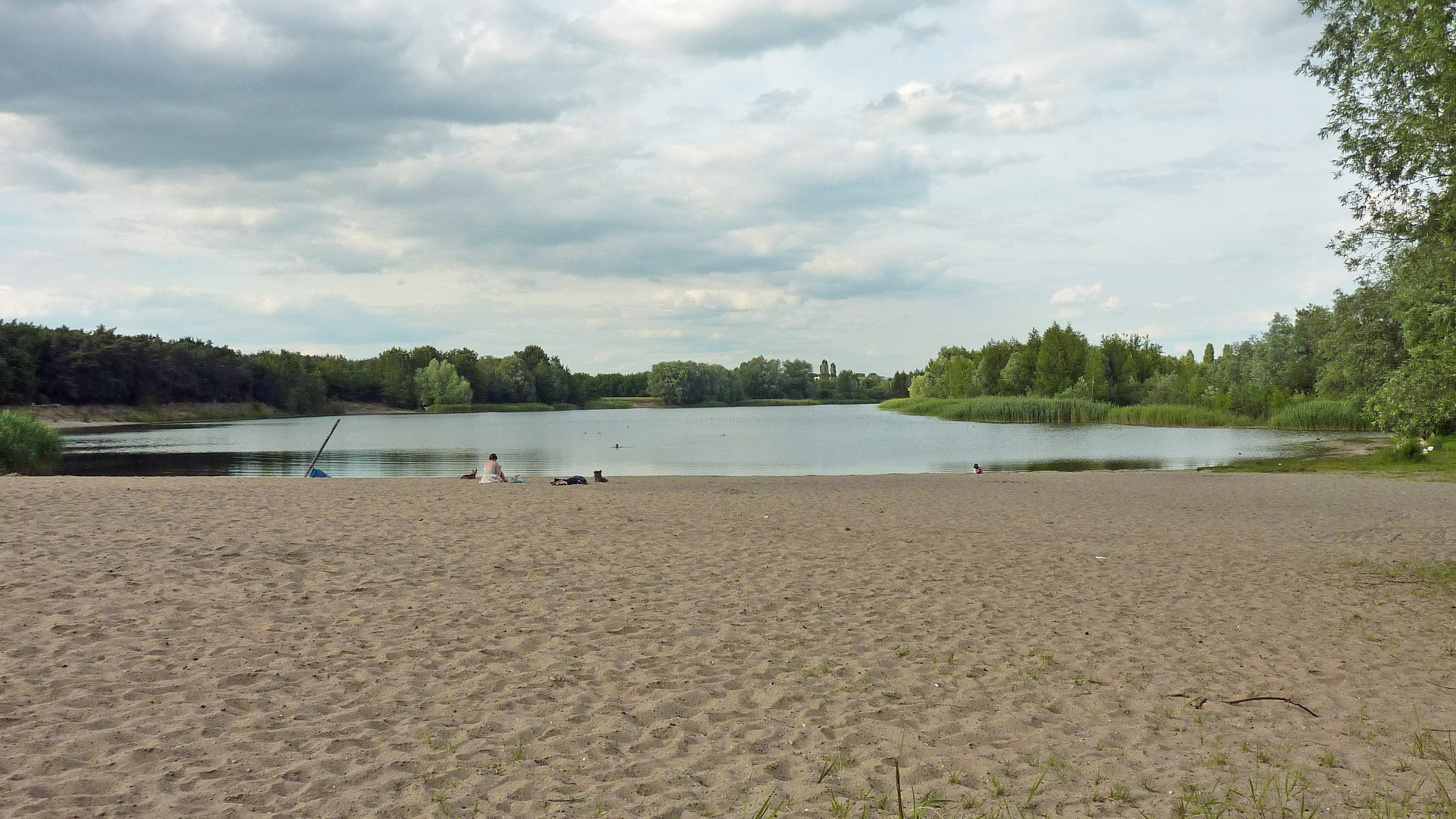 Habermannsee in Berlin-Kaulsdorf; westlicher Teil